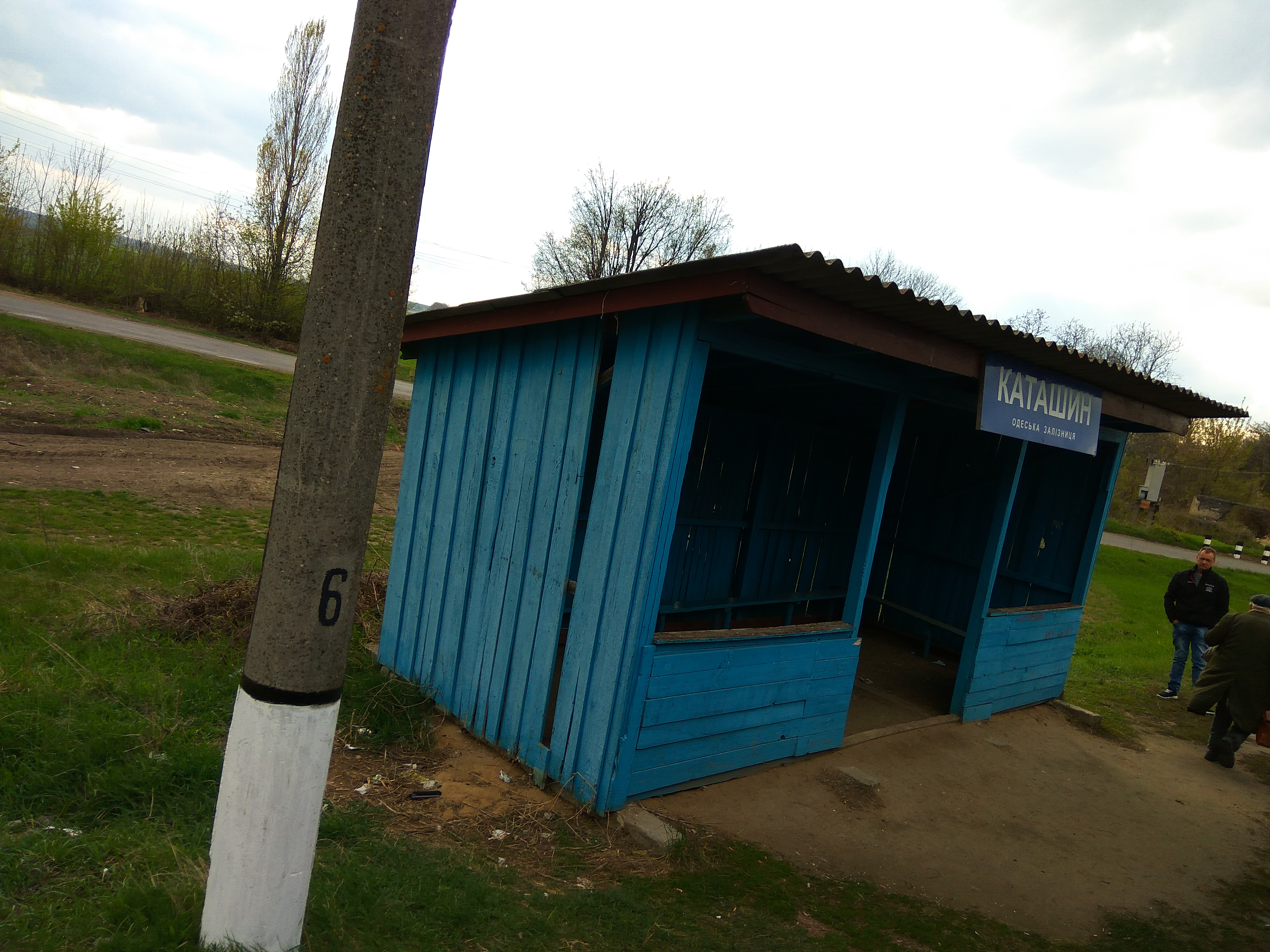 З.п. Каташин